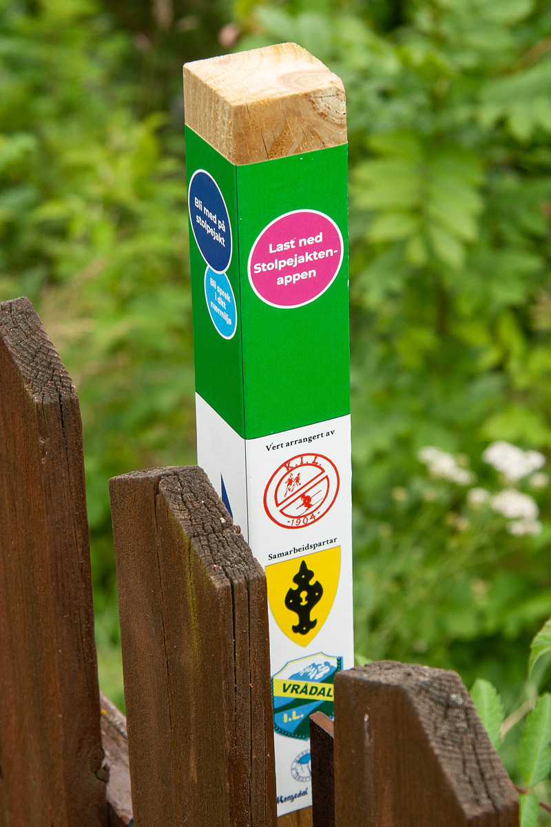 Stolpejakten i Kviteseid. Stolpens nummer er sensurert og plassering er ikke oppgitt.